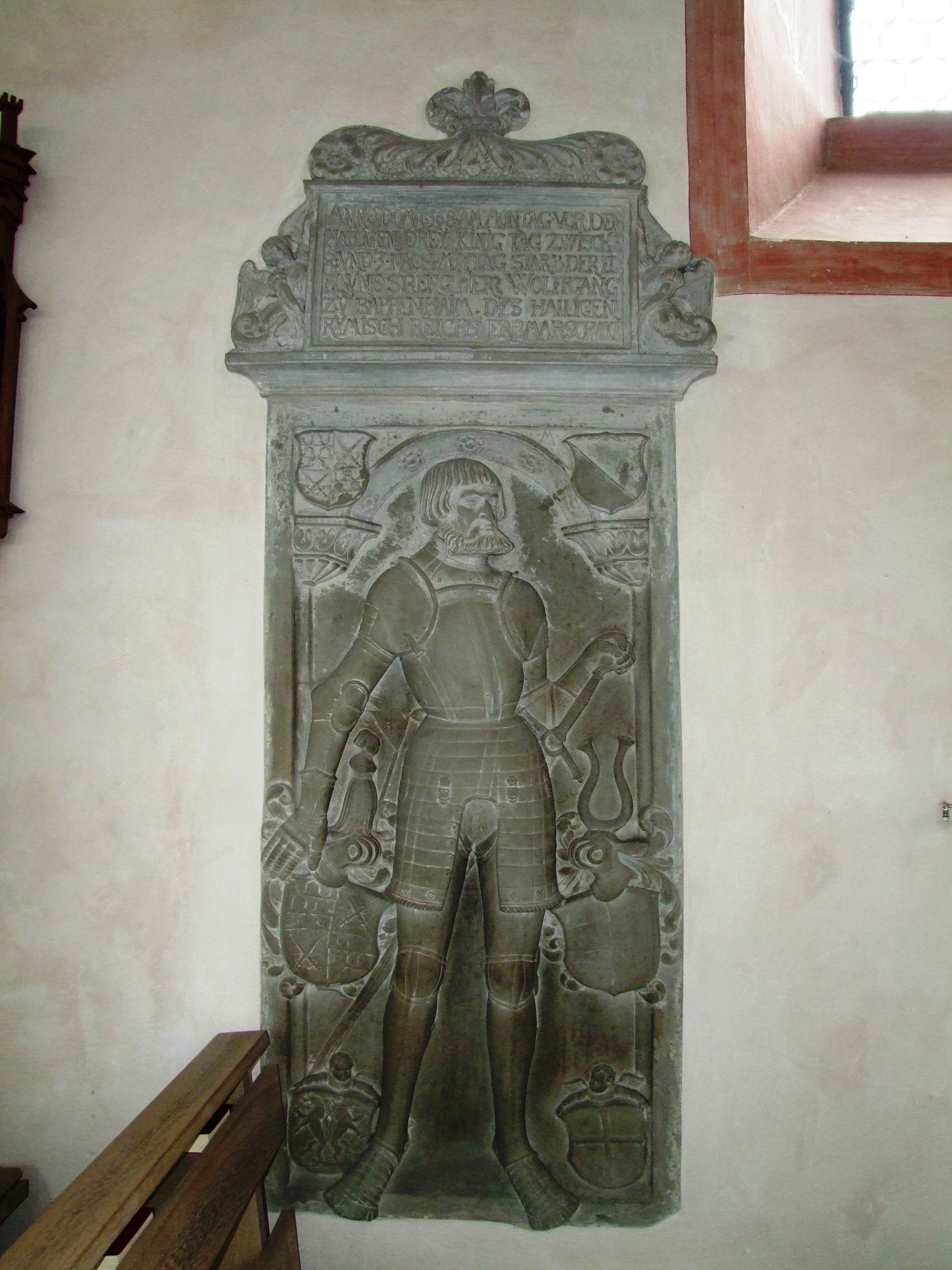 Pfarrkirche St. Philipp und Jakob im oberschwäbischen Bad Grönenbach